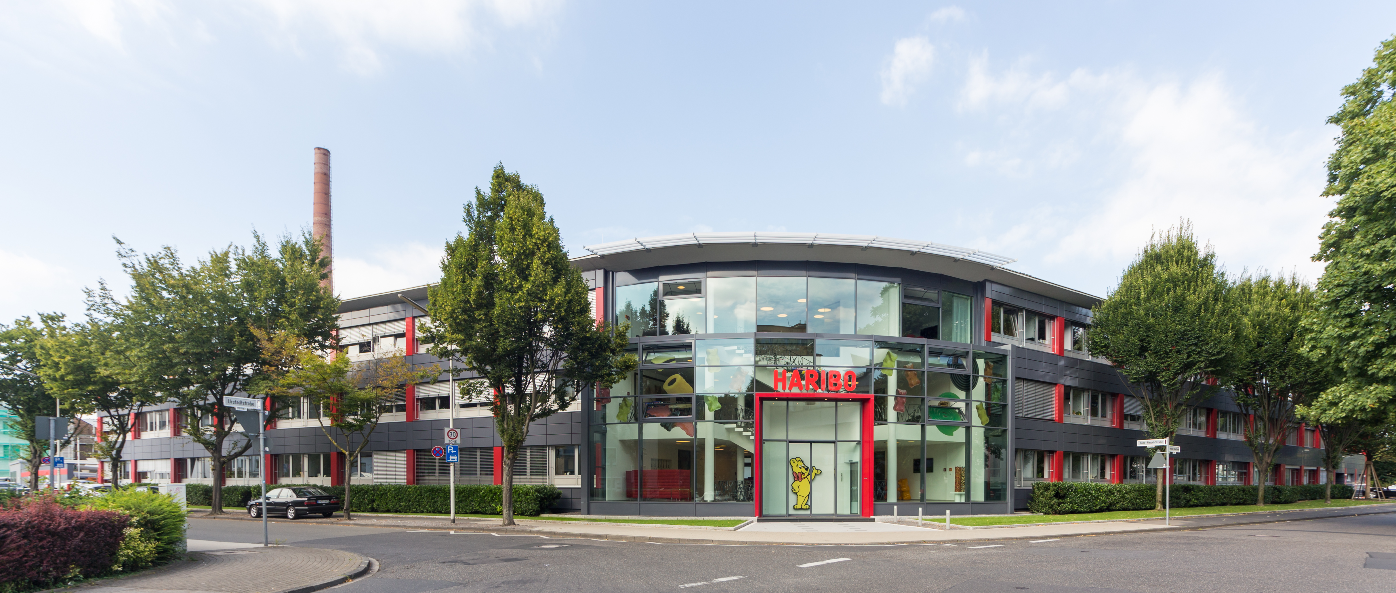 Haribo-Zentrale, Hans-Riegel-Straße 1, Bonn-Kessenich